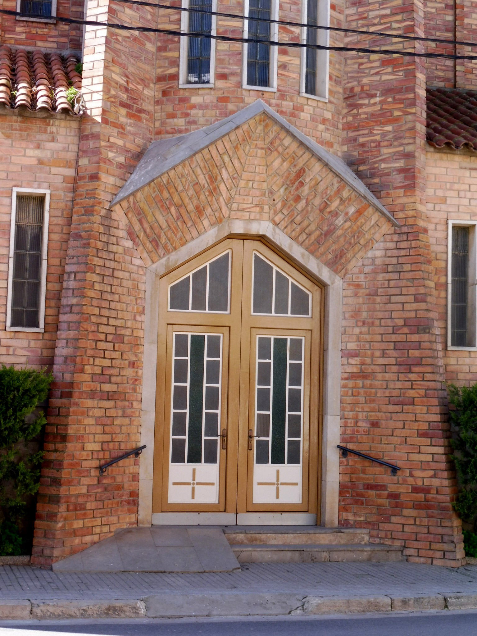 Església parroquial de Sant Joan de Térmens: portada